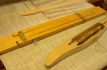 Skyttel, spännare och plockspröt (längst bort)